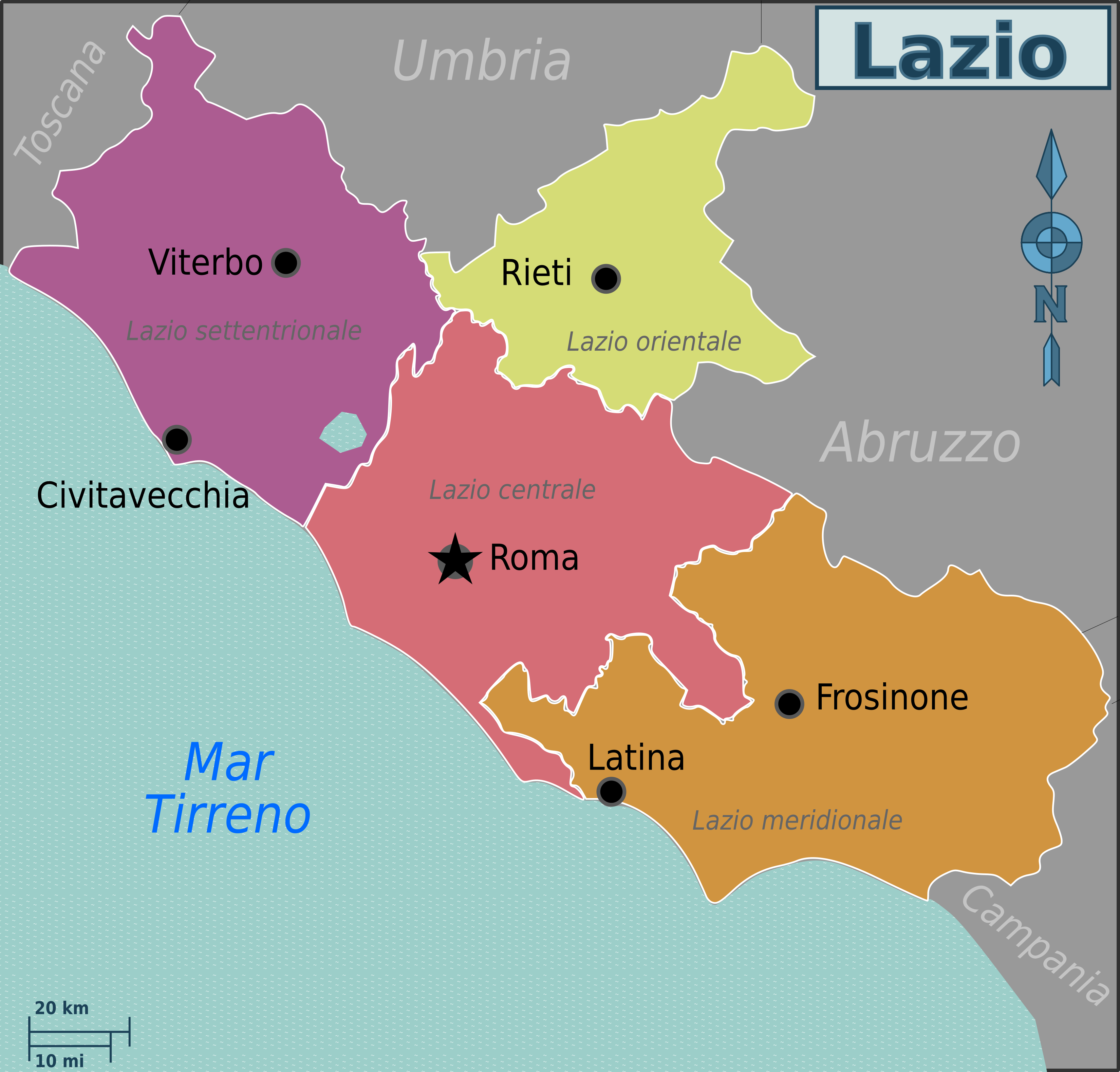 Mappa per wikivoyage